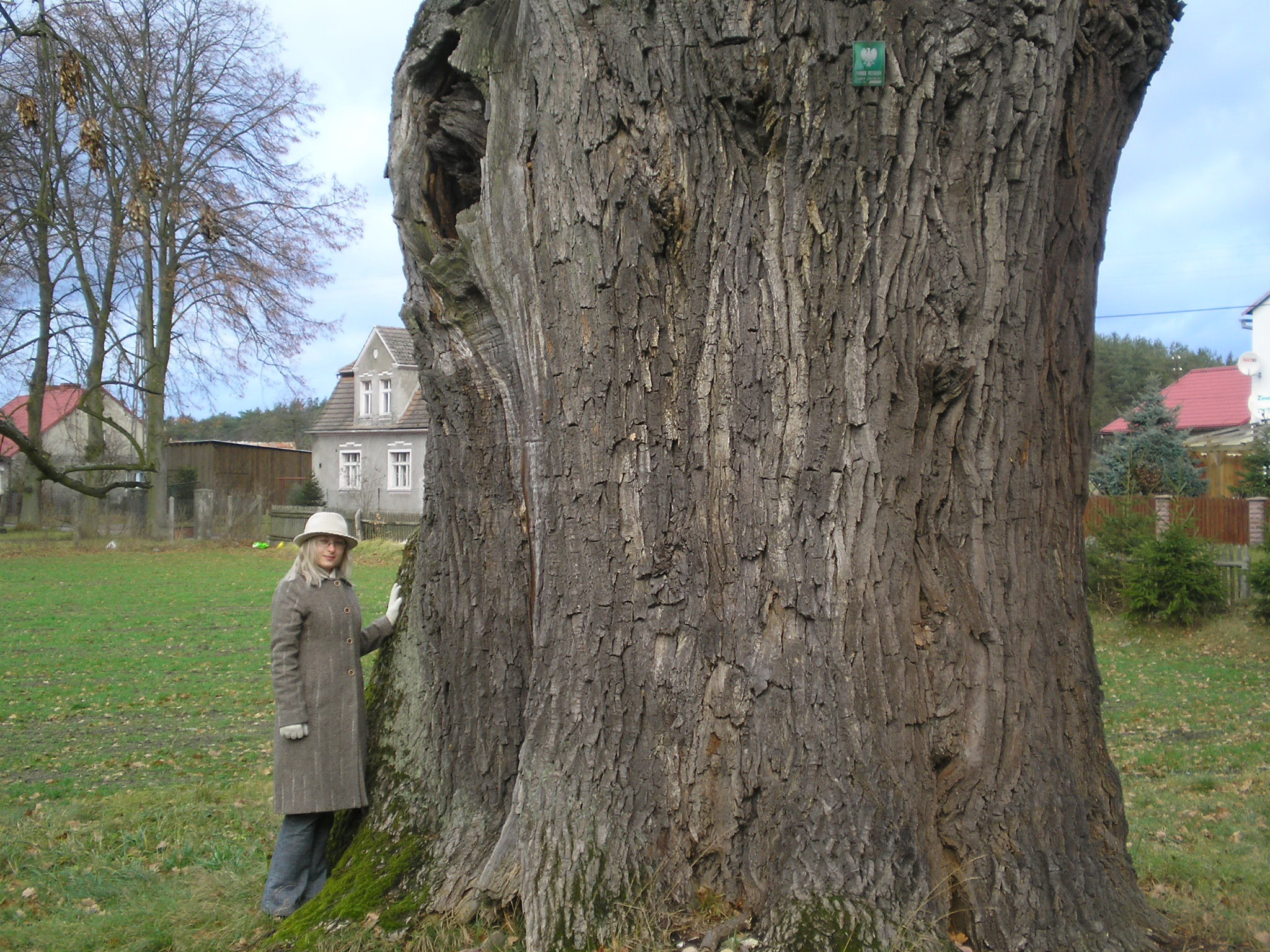 Potężne drzewo rosnące nieopodal kościoła pw. Matki Boskiej Różańcowej w Toporowie.